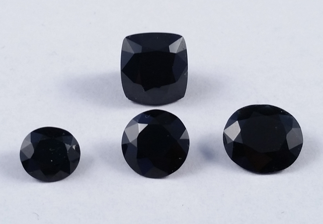 facettierter Serendibit aus Myanmar